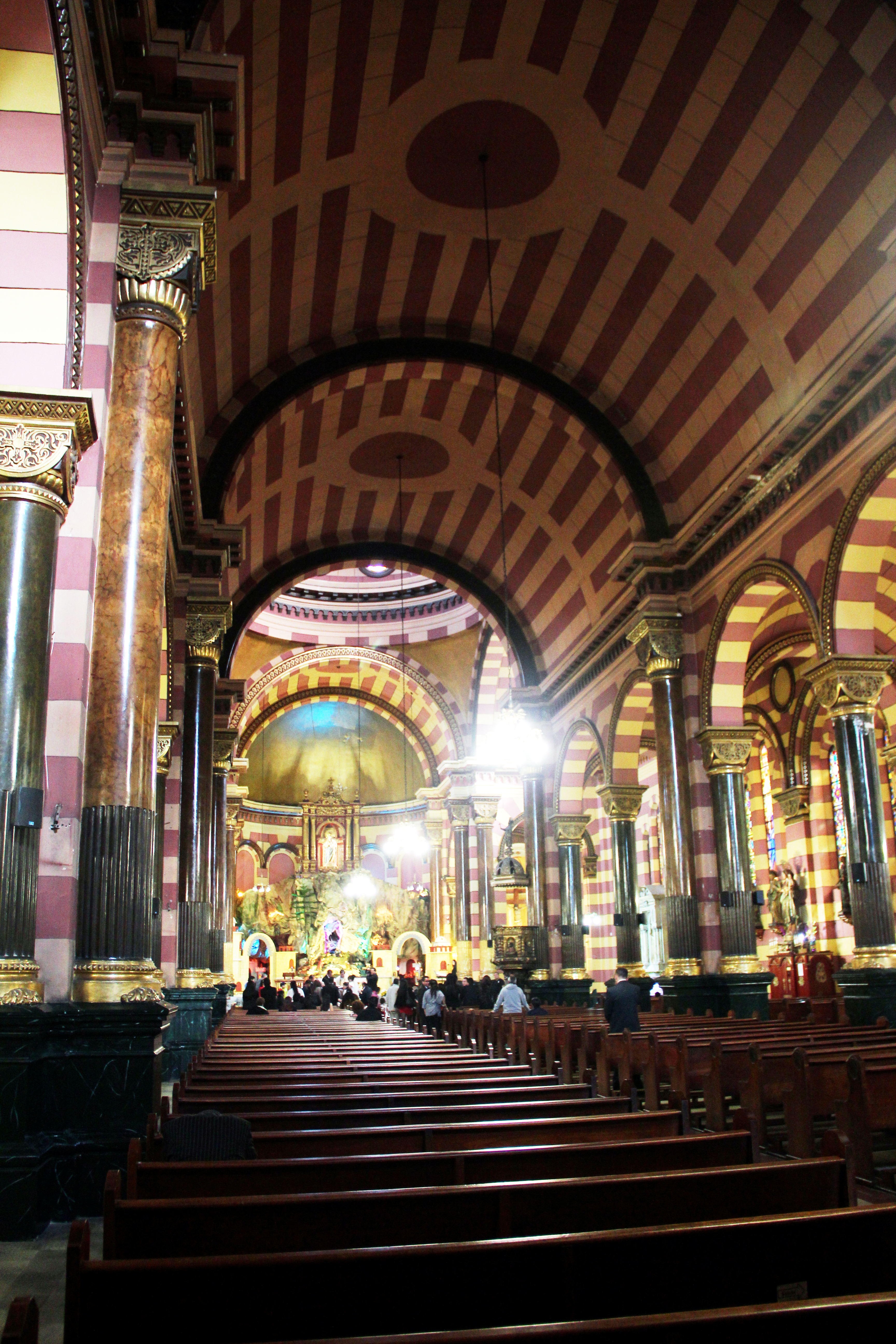 Interior de las naves de la iglesia de nuestra señora de las nieves en Bogotá